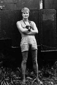 Autoportrait